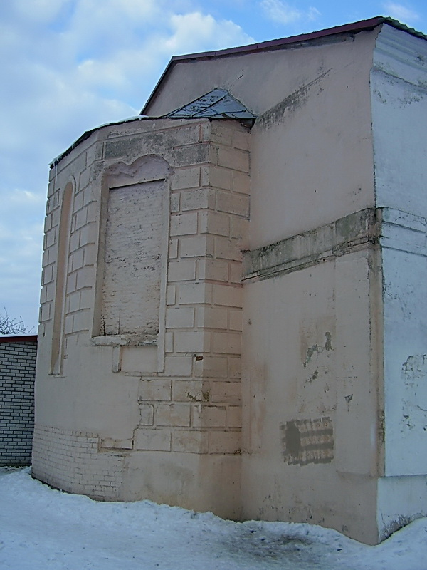 Чэрыкаў. Касцёл